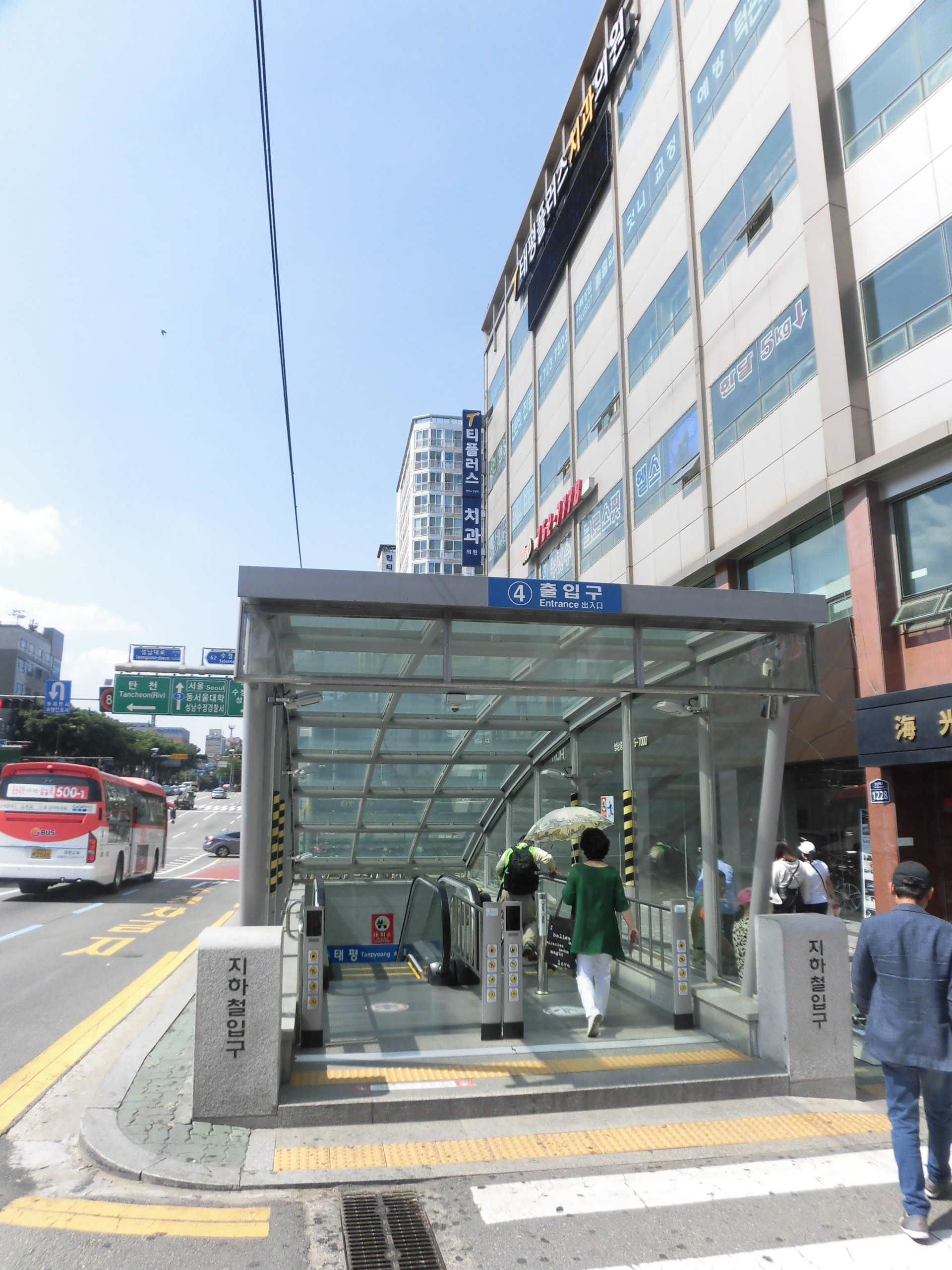 분당선 태평역 4번출구